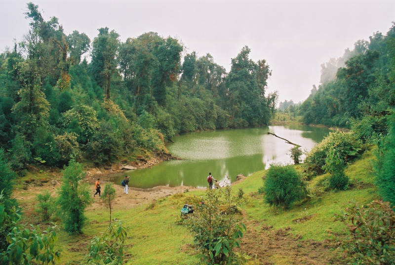 Mulkharka Lake near Mulkharka in Lingsey.